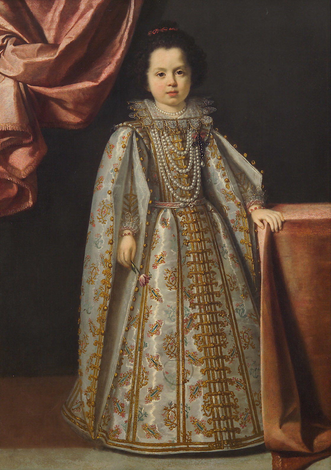 Vittoria della Rovere (1622-1694) im Alter von vier bis fünf Jahren